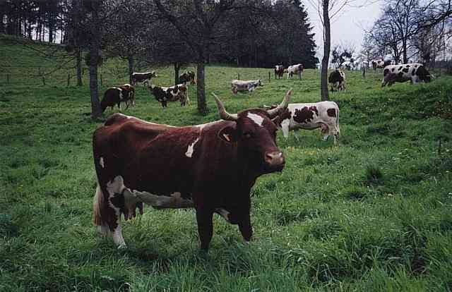 Vache de race ferrandaise.